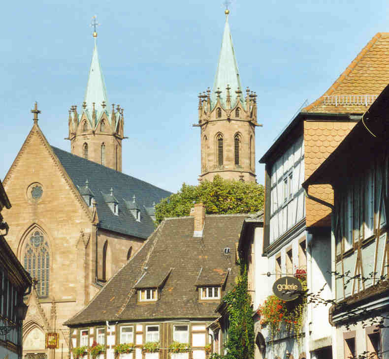 Blick in Ladenburgs Altstadt. Im Hintergrund erhebt sich monumental die Doppelturm-Kirche Sankt Gallus.